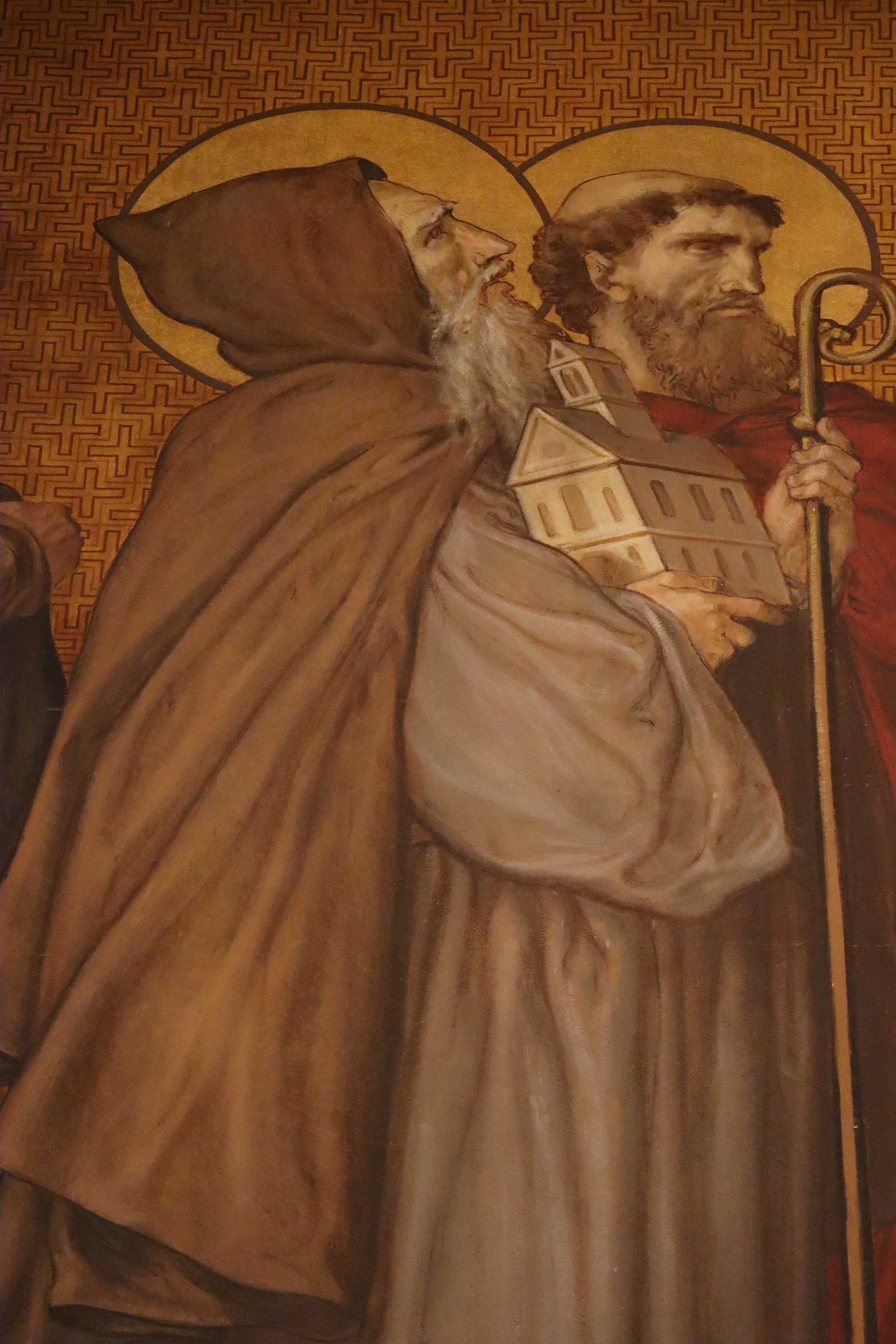 Saint Méen et Saint Austol. Procession des saints de Bretagne. Diocèse de Saint-Malo. Déambulatoire de la métropole Saint-Pierre de Rennes (35).